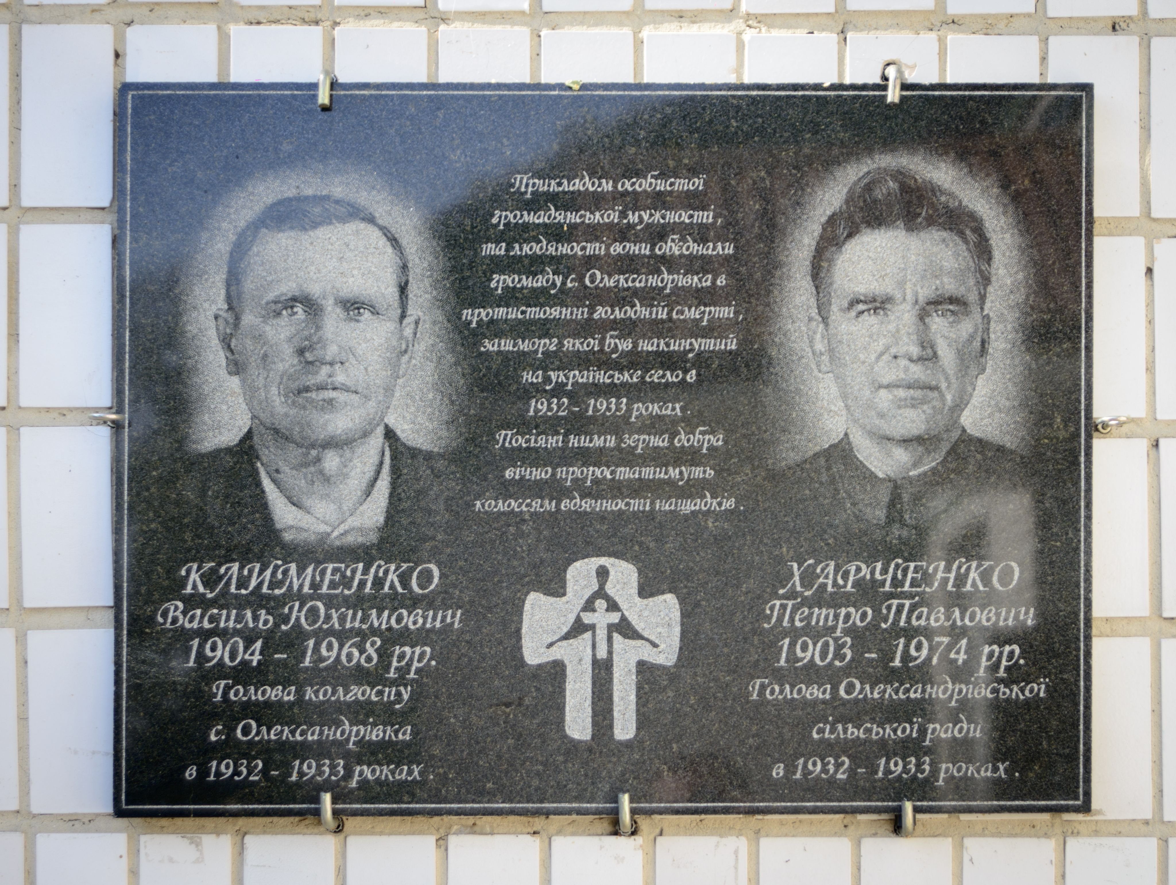 Пам'ятна дошка на честь Клименка Василя Юхимовича та Харченка Петра Павловича (2008) у селі Олександрівка в Пирятинському районі Полтавської області Знято під час Вело-вікі-експедиція селами Гребінківського та Пирятинського районів